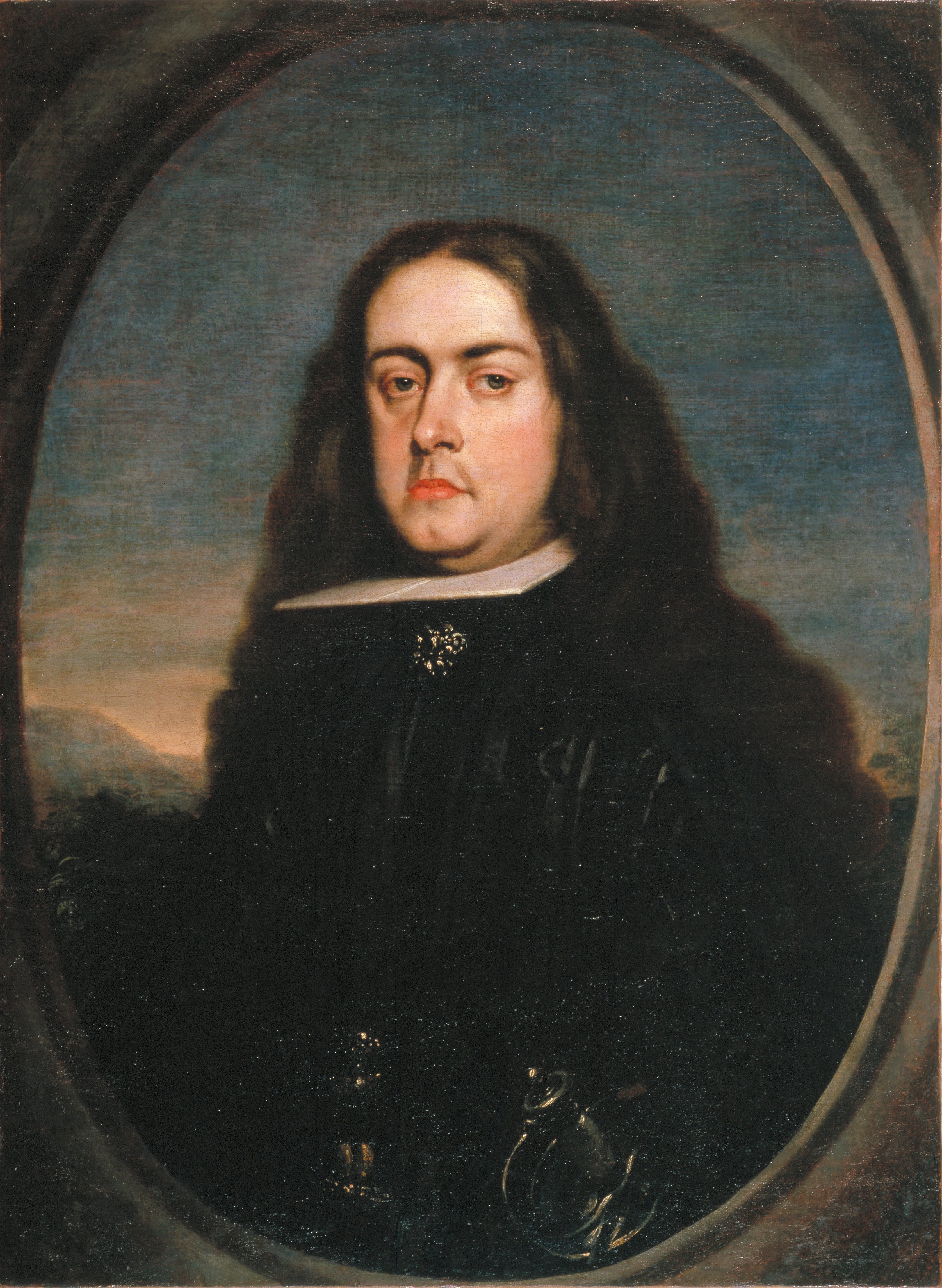 Retrato del aristócrata y politico español Juan Francisco de la Cerda, VIII duque de Medinaceli (1637-1691), que fue el VIII duque de Medinaceli y también el VII marqués de Cogolludo, el IV marqués de Alcalá de la Alameda, el VI duque de Alcalá de los Gazules, el IX conde de Los Molares, el IX marqués de Tarifa y el VIII conde de El Puerto de Santa María.